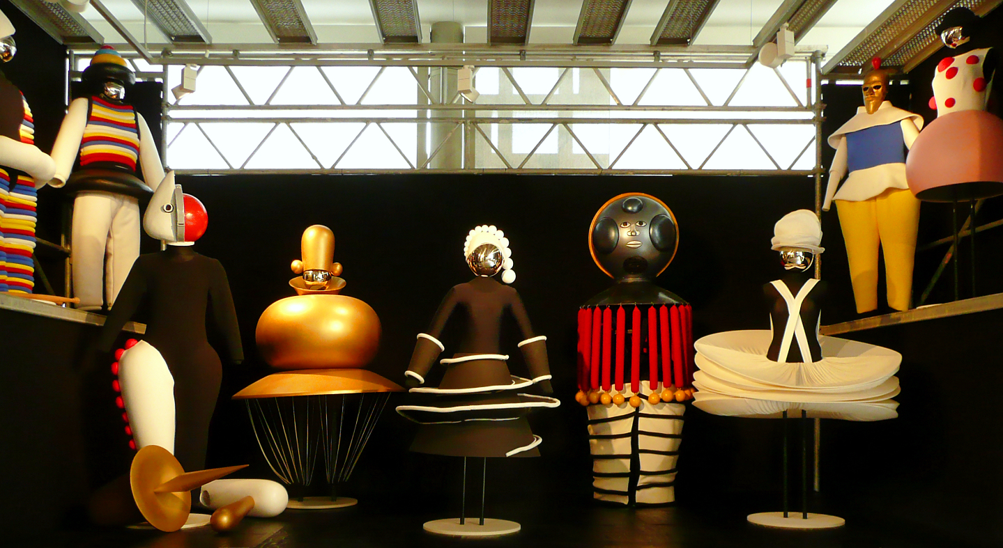 Oskar Schlemmer Triadisches Ballett, Nachbildung der Figuren